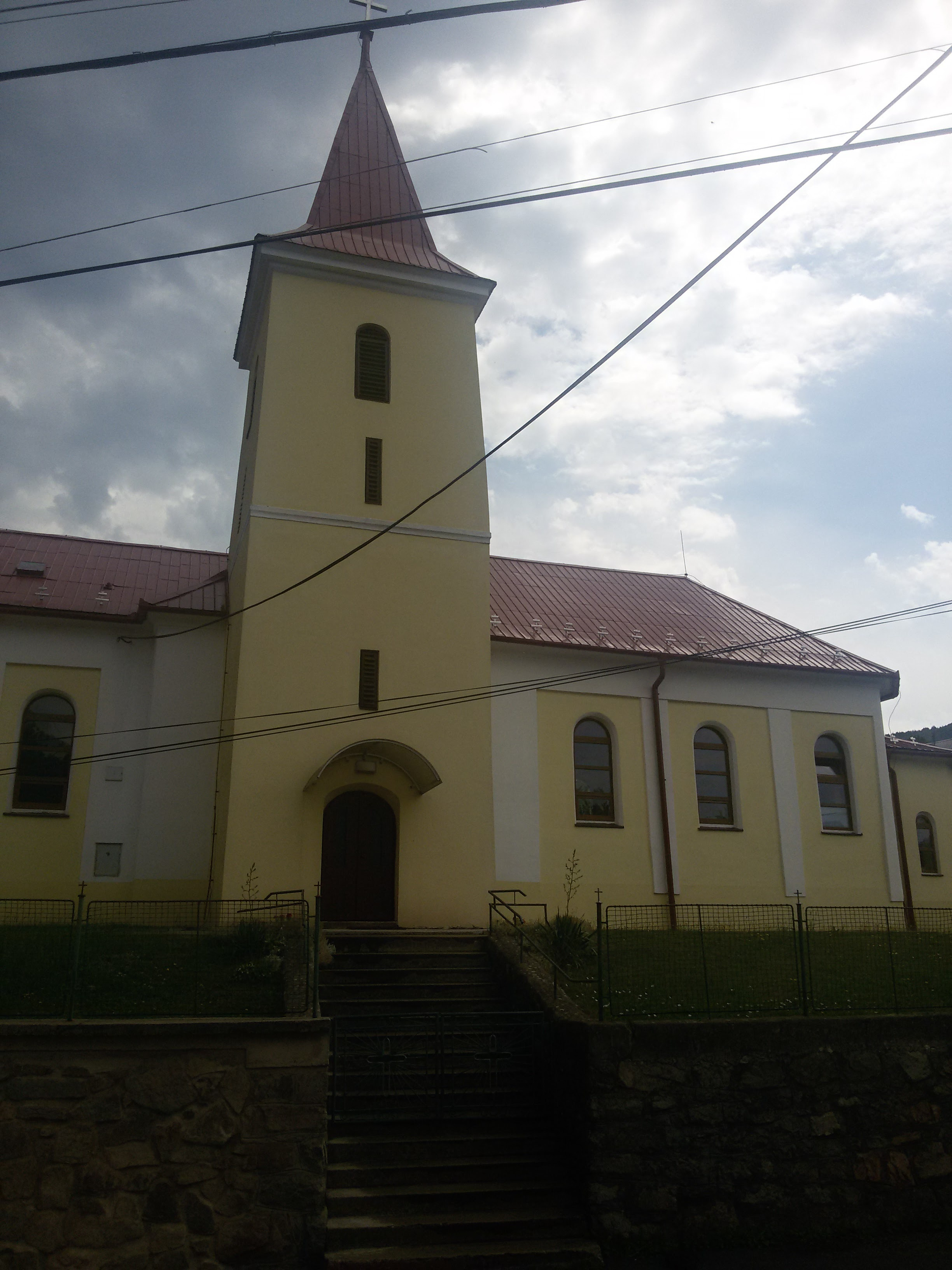 Čavoj